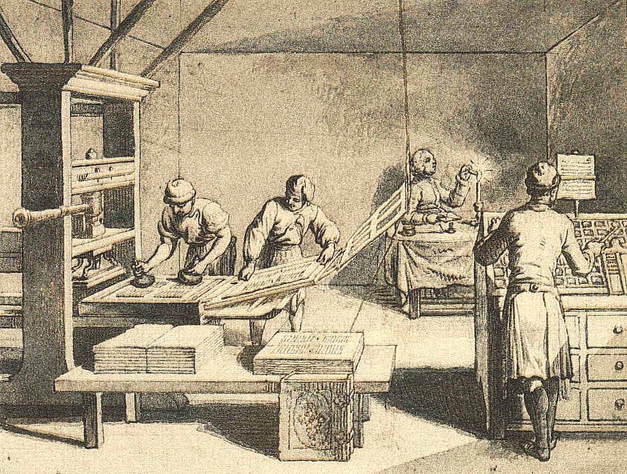 Tab. XXI c. Die Buchdruckerei. (Beschreibung lt. Quelle)